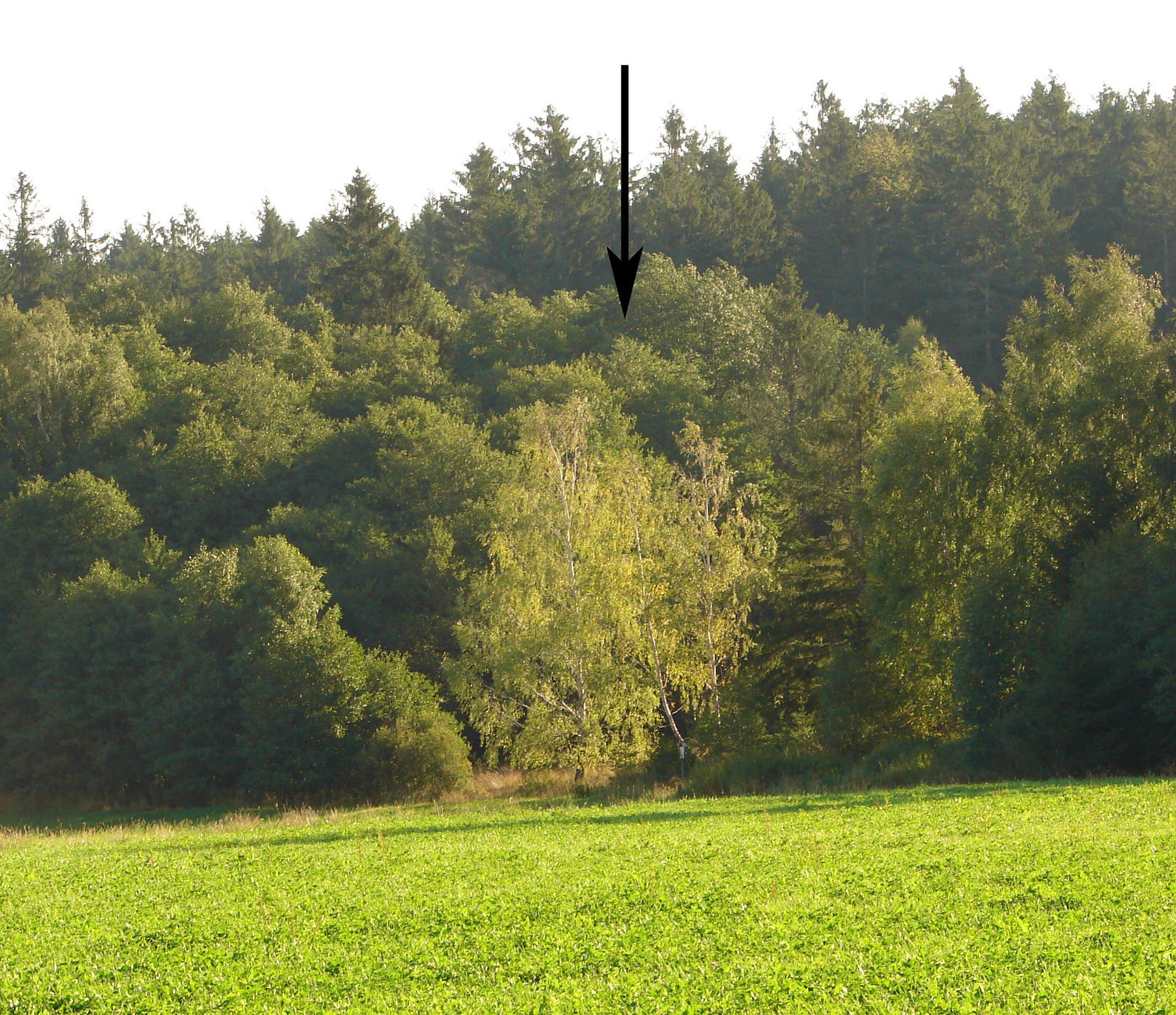 PP Ještěnice - celkový pohled na lokalituPP Ještěnice - celkový pohled na lokalitu